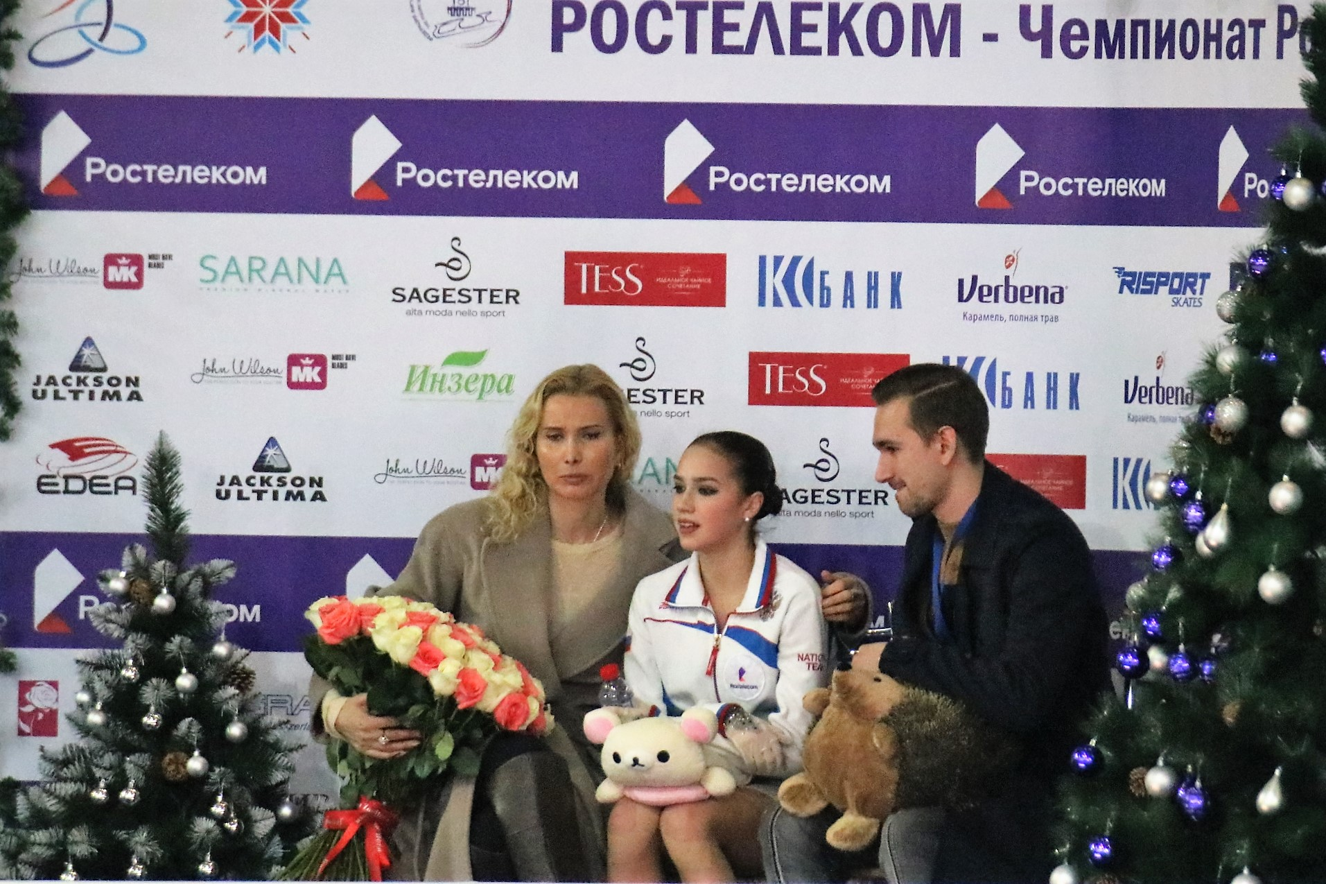 Алина Загитова с тренерами Этери Тутберидзе и Даниилом Глехенгаузом на чемпионате России по фигурному катанию на коньках 2019